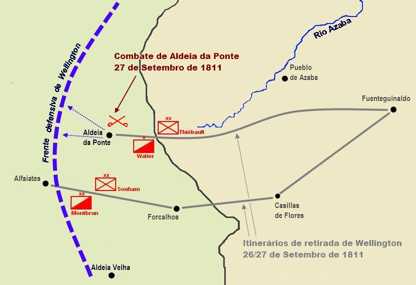 Mapa contendo os itinerários de retirada de Fuenteguinaldo, as unidades francesas que atacaram Aldeia da Ponte e a linha geral de defesa de Wellington.